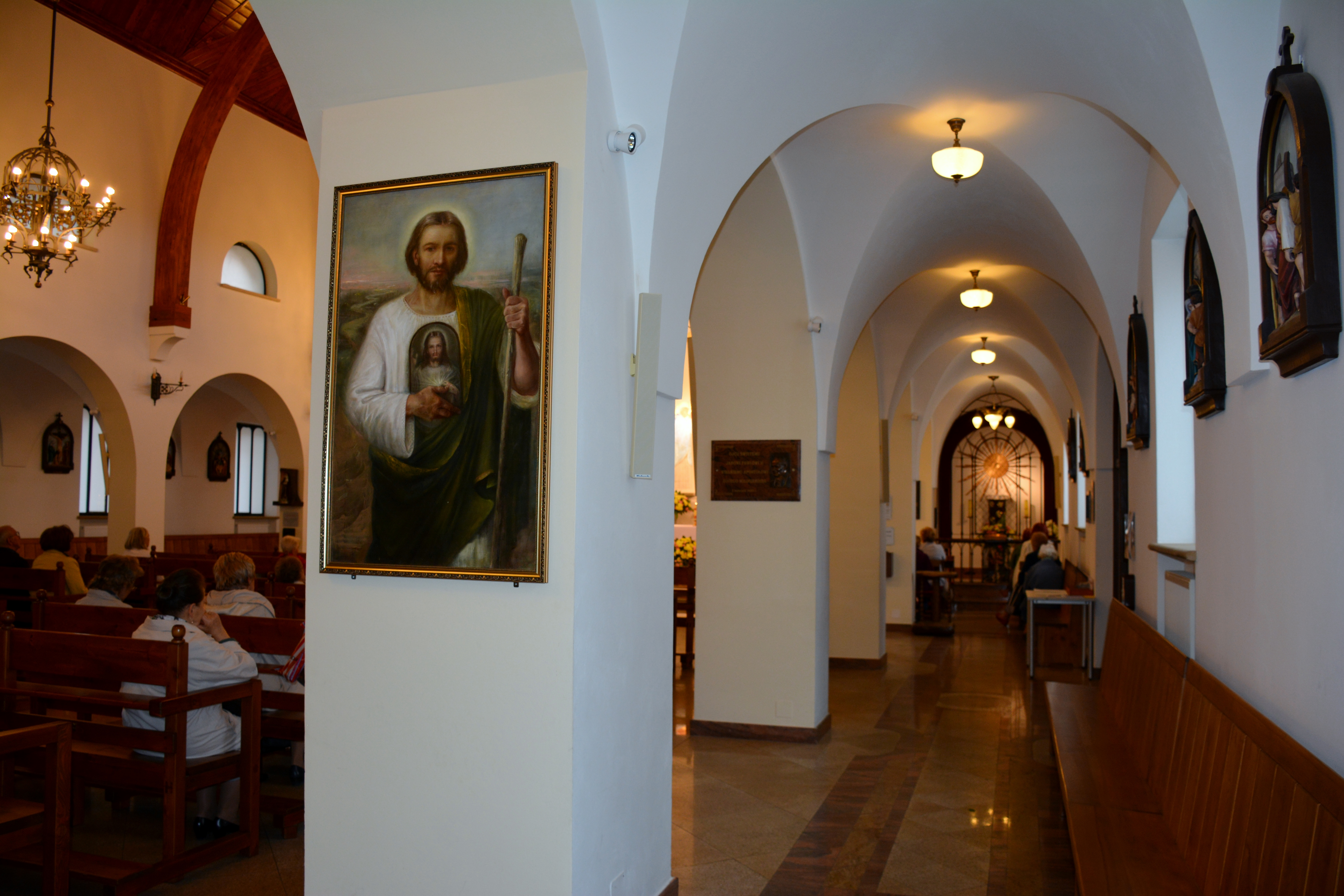 Młynów, Warszawa, Poland